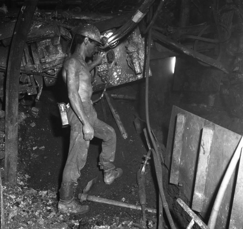 Italienische Gastarbeiter (Bergleute) in Walsum